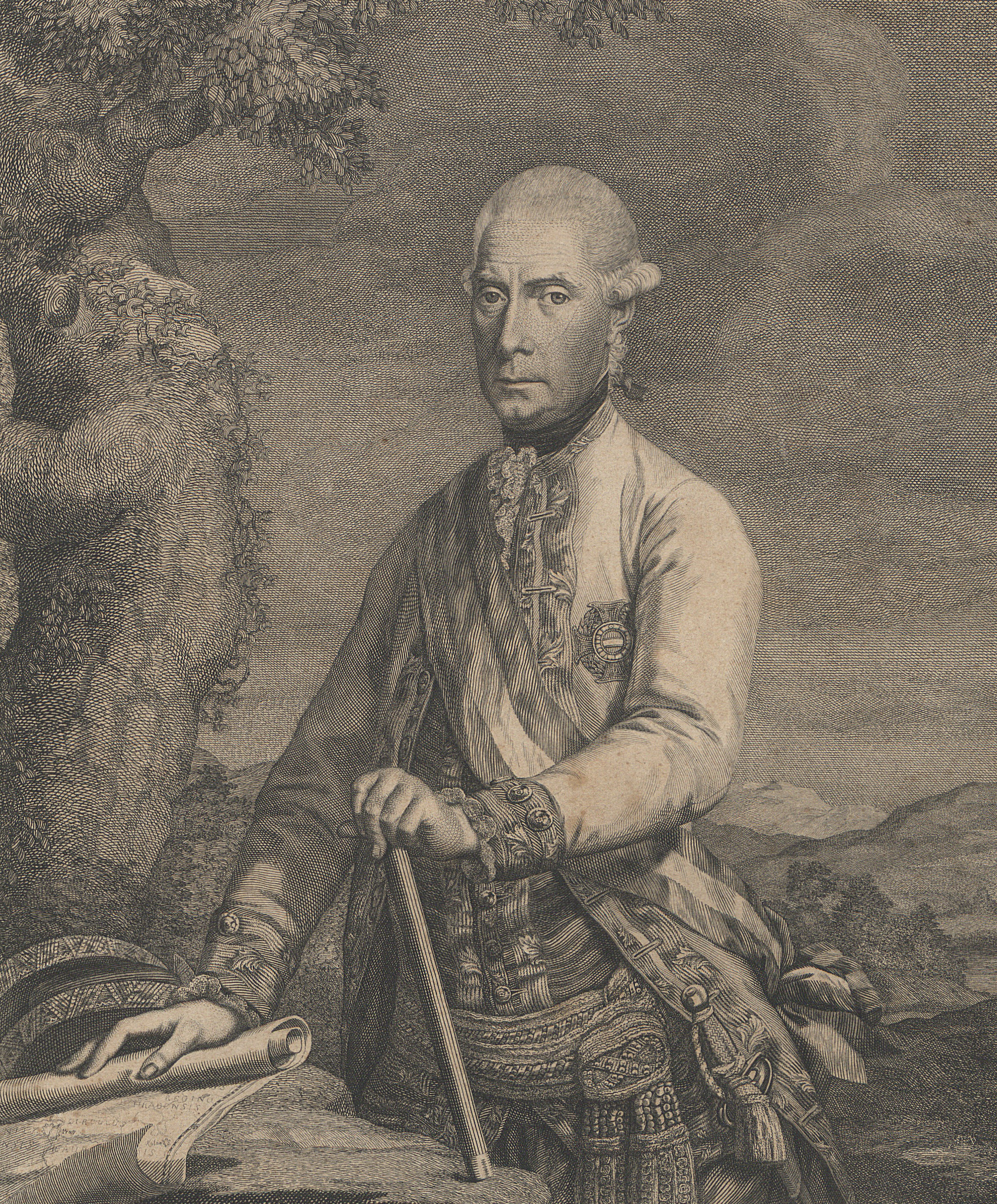 Gideon Ernst von Laudon